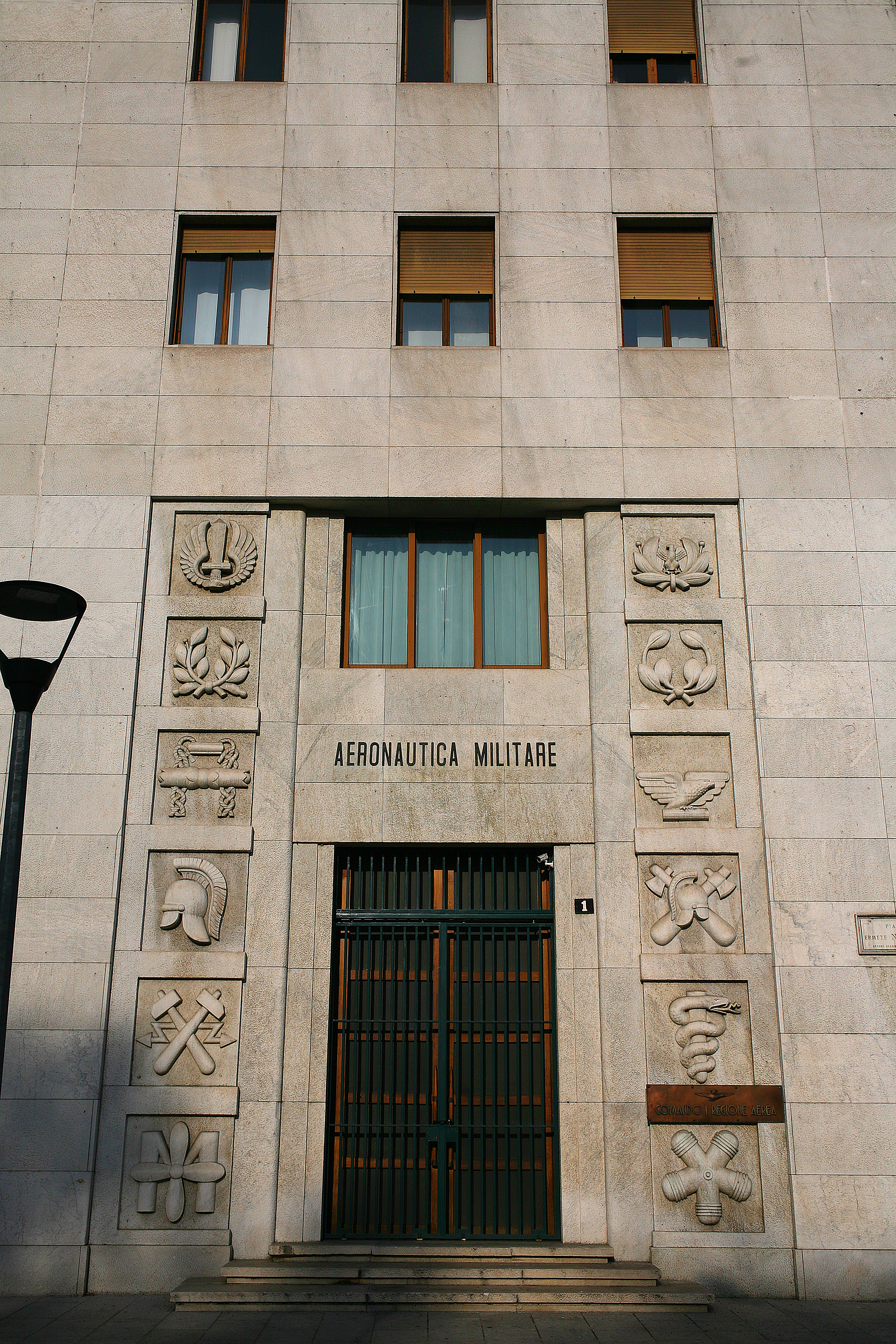 Portale di ingresso del Comando della Prima Regione Aerea, piazzale Novelli, Milano; architetto Luigi Lorenzo Secchi